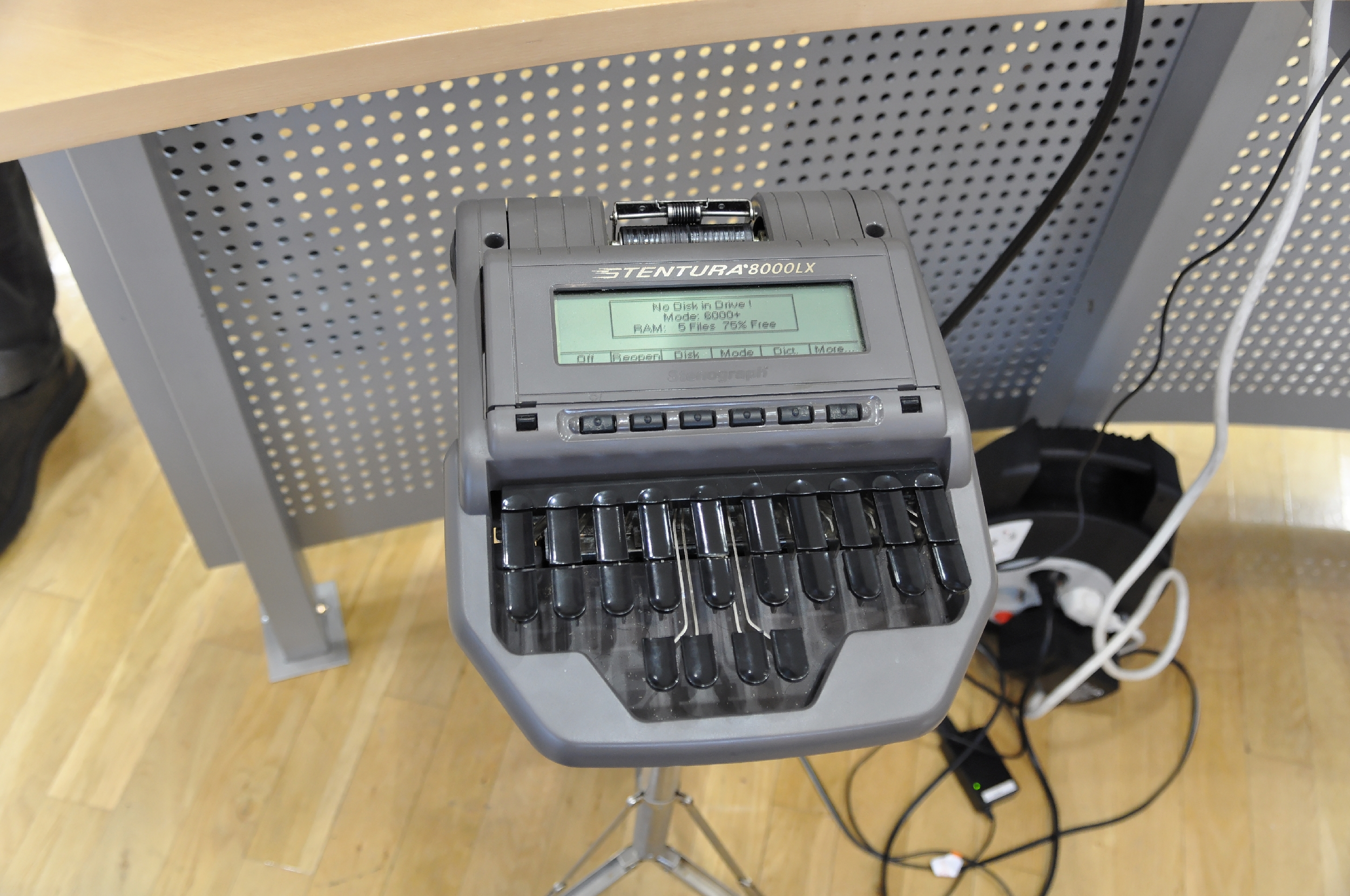 Fotos vom Landtagsprojekt Sachsen-Anhalt 2012